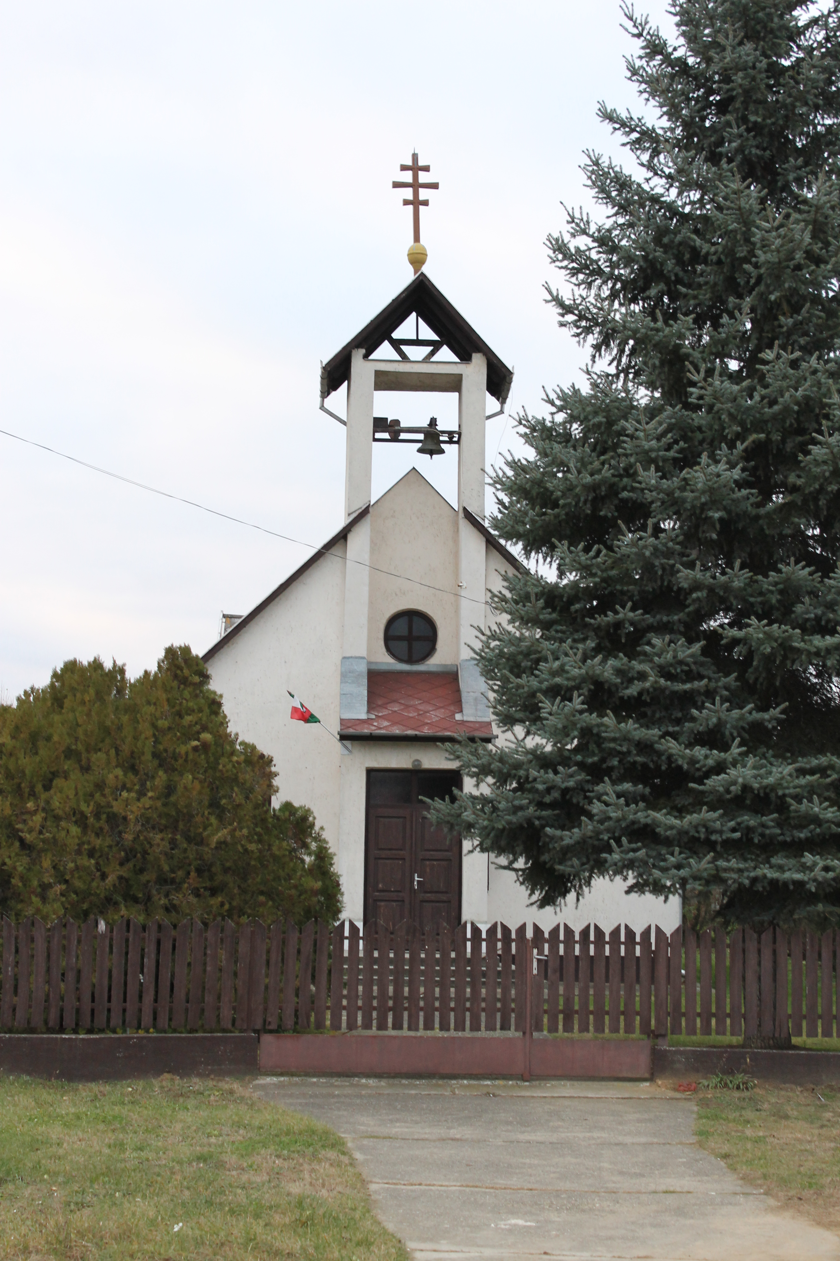 A 49137-es úton, Abapusztán található Keresztelő Szent János görög katolikus templom